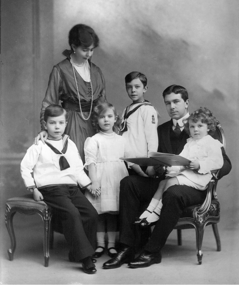 Kronprins Gustaf Adlof och Margareta med barnen. Från vänster Sigvard, Ingrid, Gustaf Adolf och Bertil.